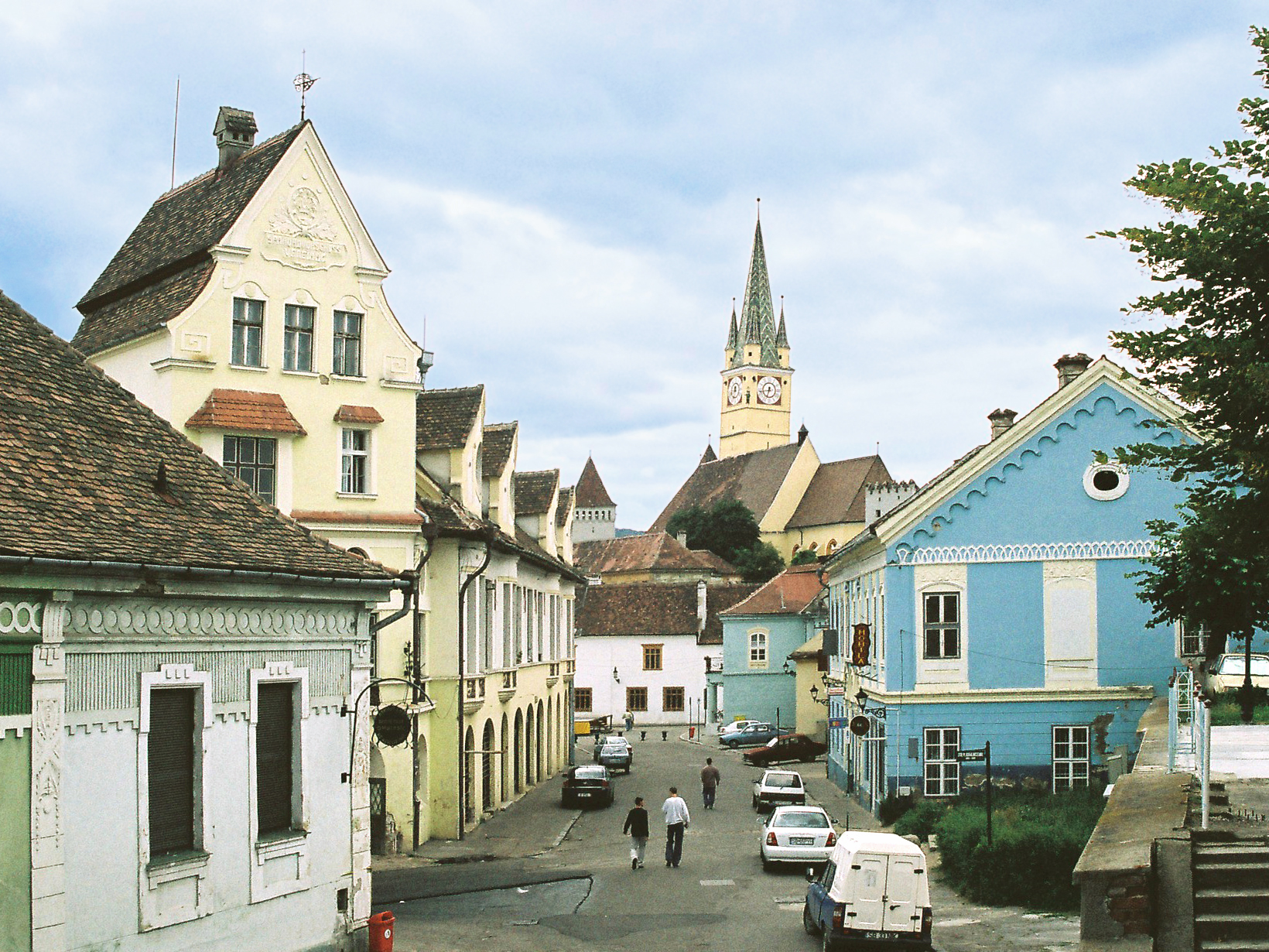 Str. N. Iorga (Forkeschgasse) in Mediaș/Mediasch, Romania